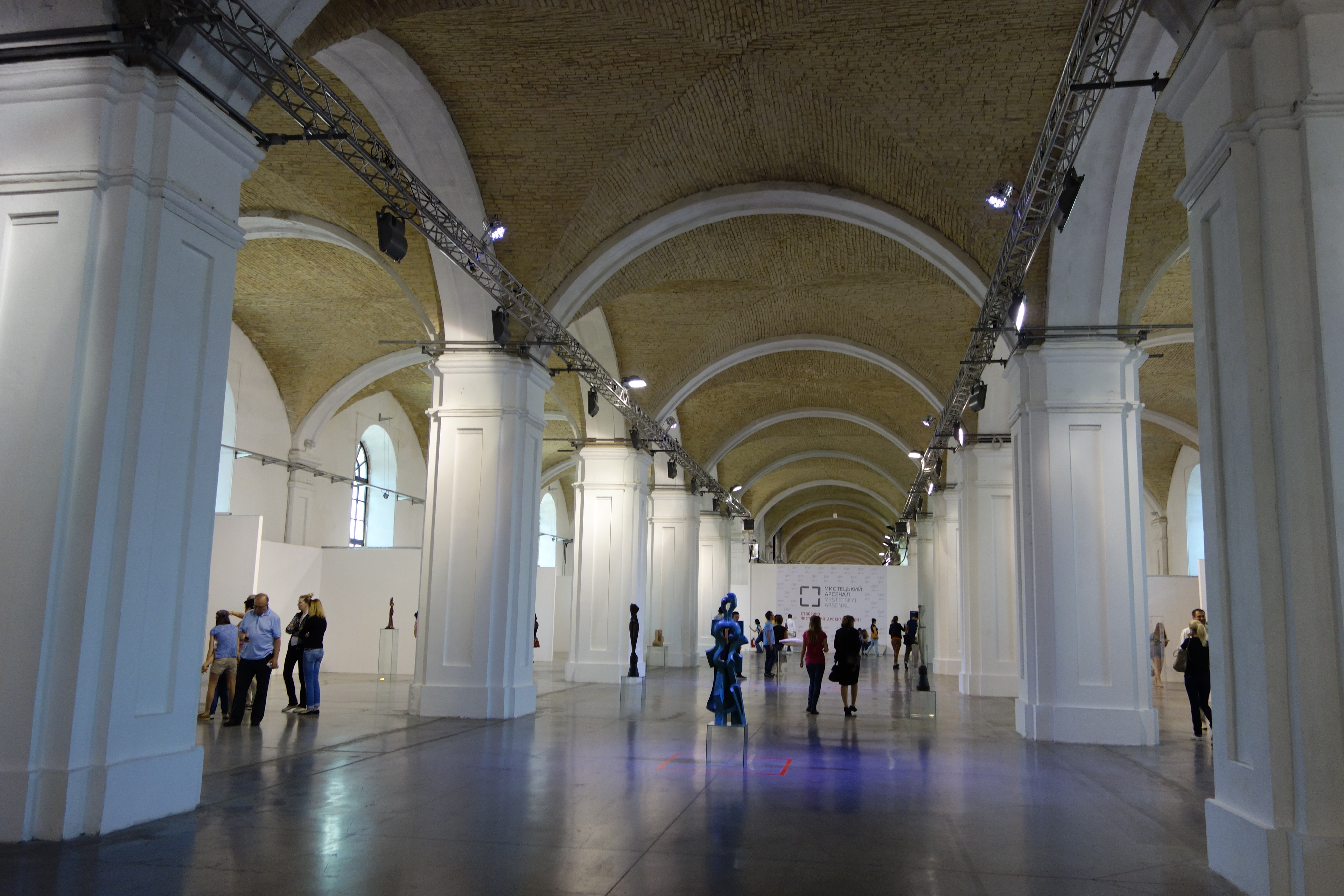 Національний культурно-мистецький та музейний комплекс «Мистецький арсенал»